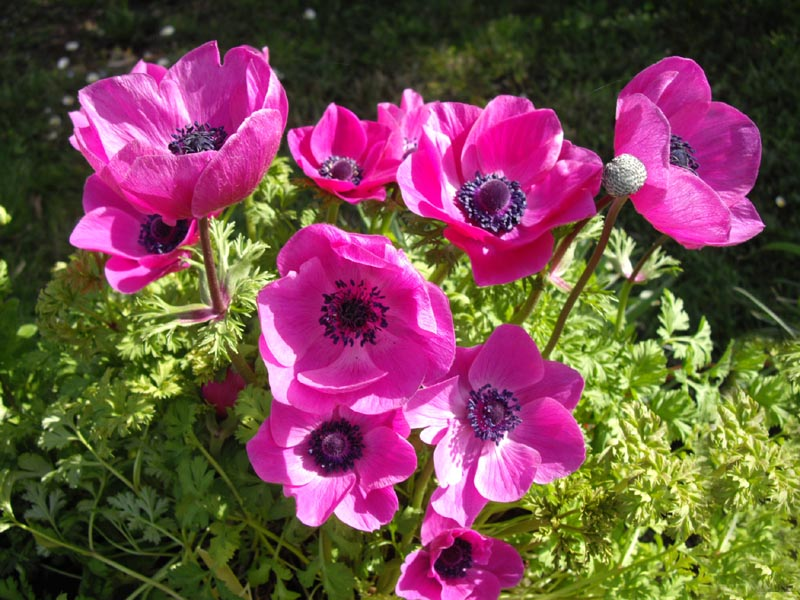 Anemone coronaria 'Sylphide'